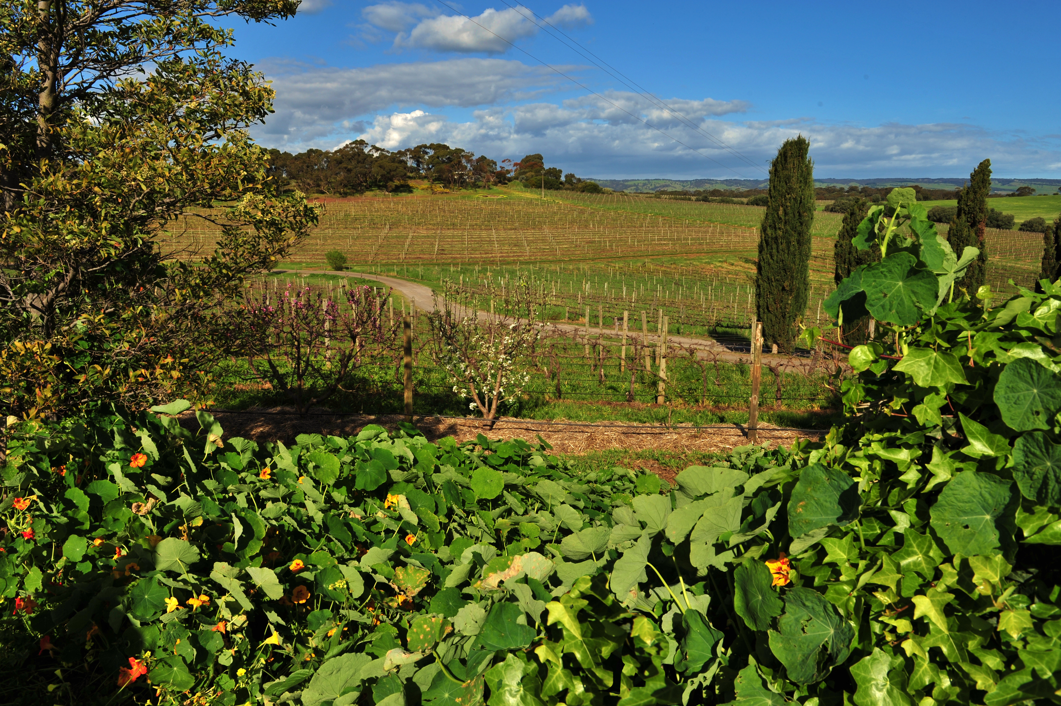 Coriole Wines Vines